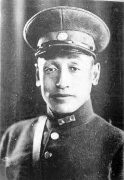 王以哲（1896年－1937年2月2日）